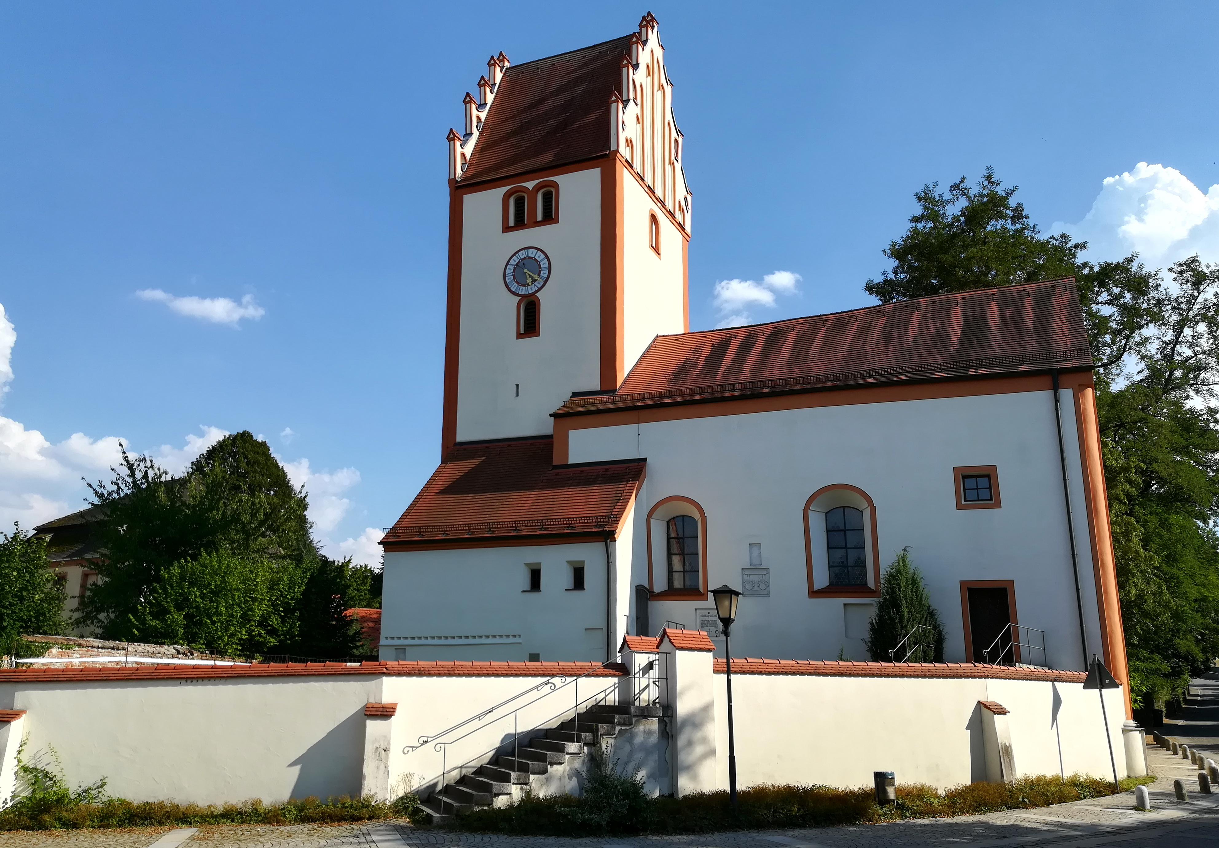 Die ehemalige katholische Pfarrkirche St. Johannes der Täufer (auch St. Johannes Baptist) in Rohrbach in der Hallertau entstand im 15. Jahrhundert an der Stelle eines gotischen Vorgängerbaus.